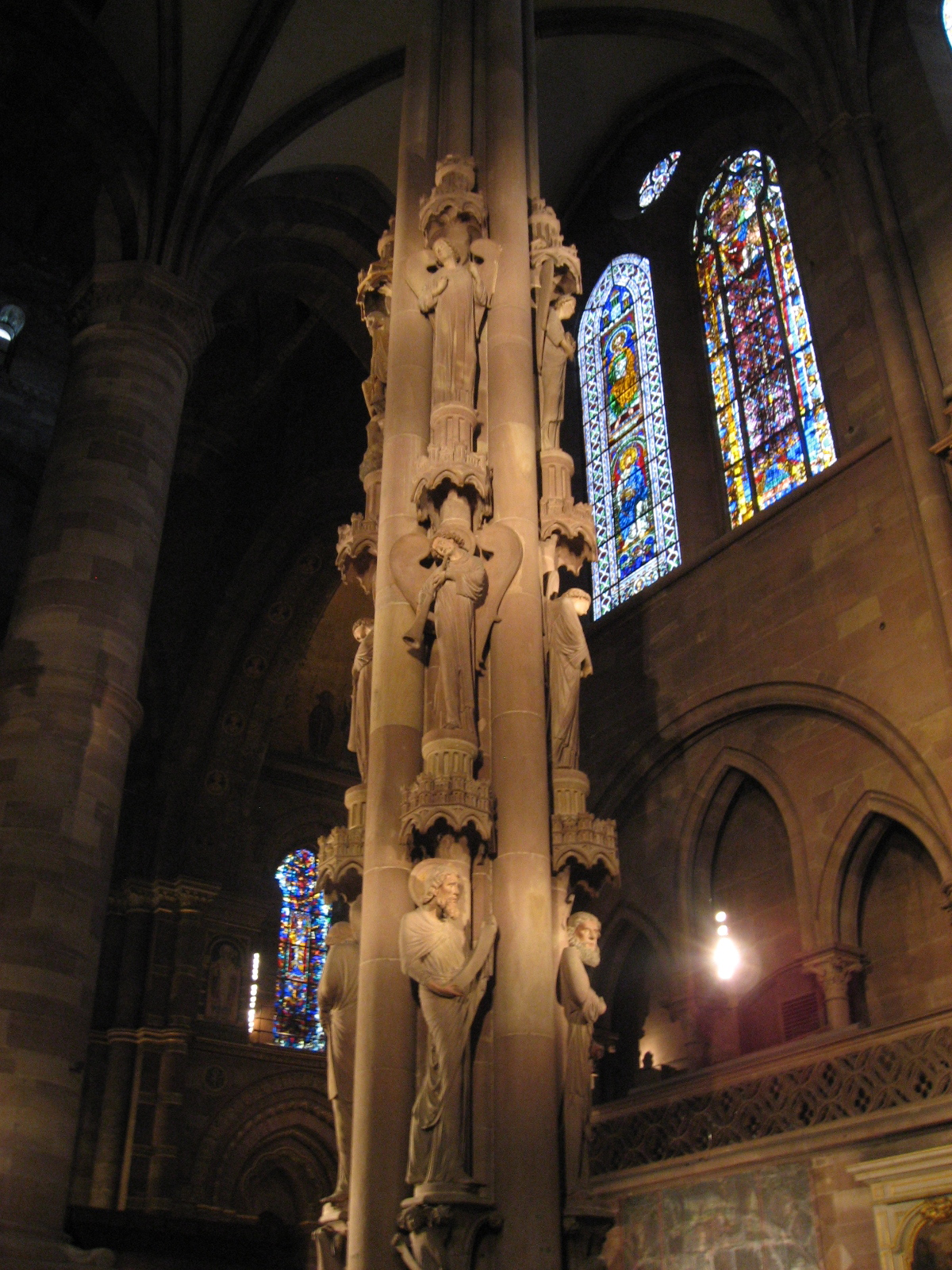 Säule im Liebfrauenmünster von Straßburg.